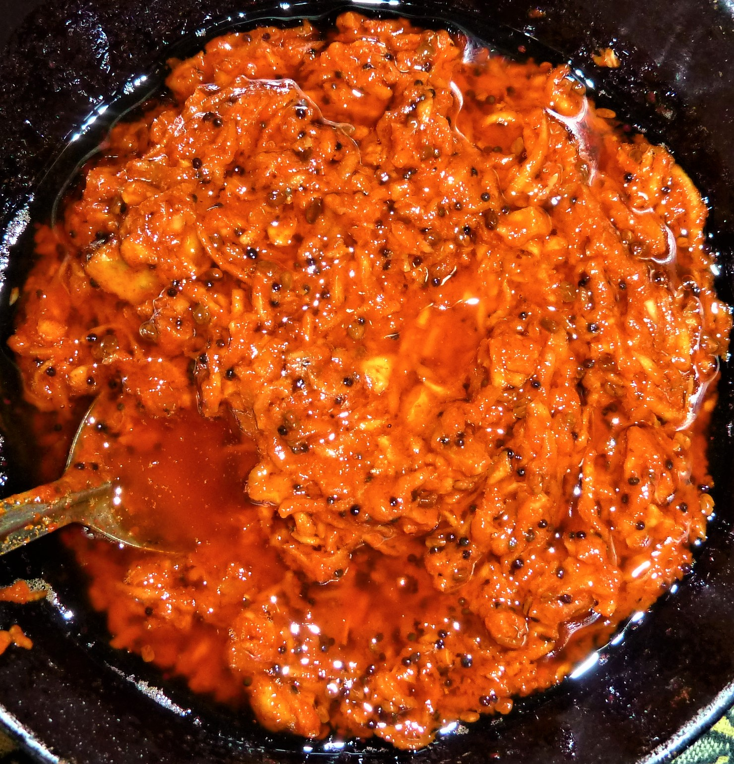 మామిడికాయ కోరు పచ్చడి